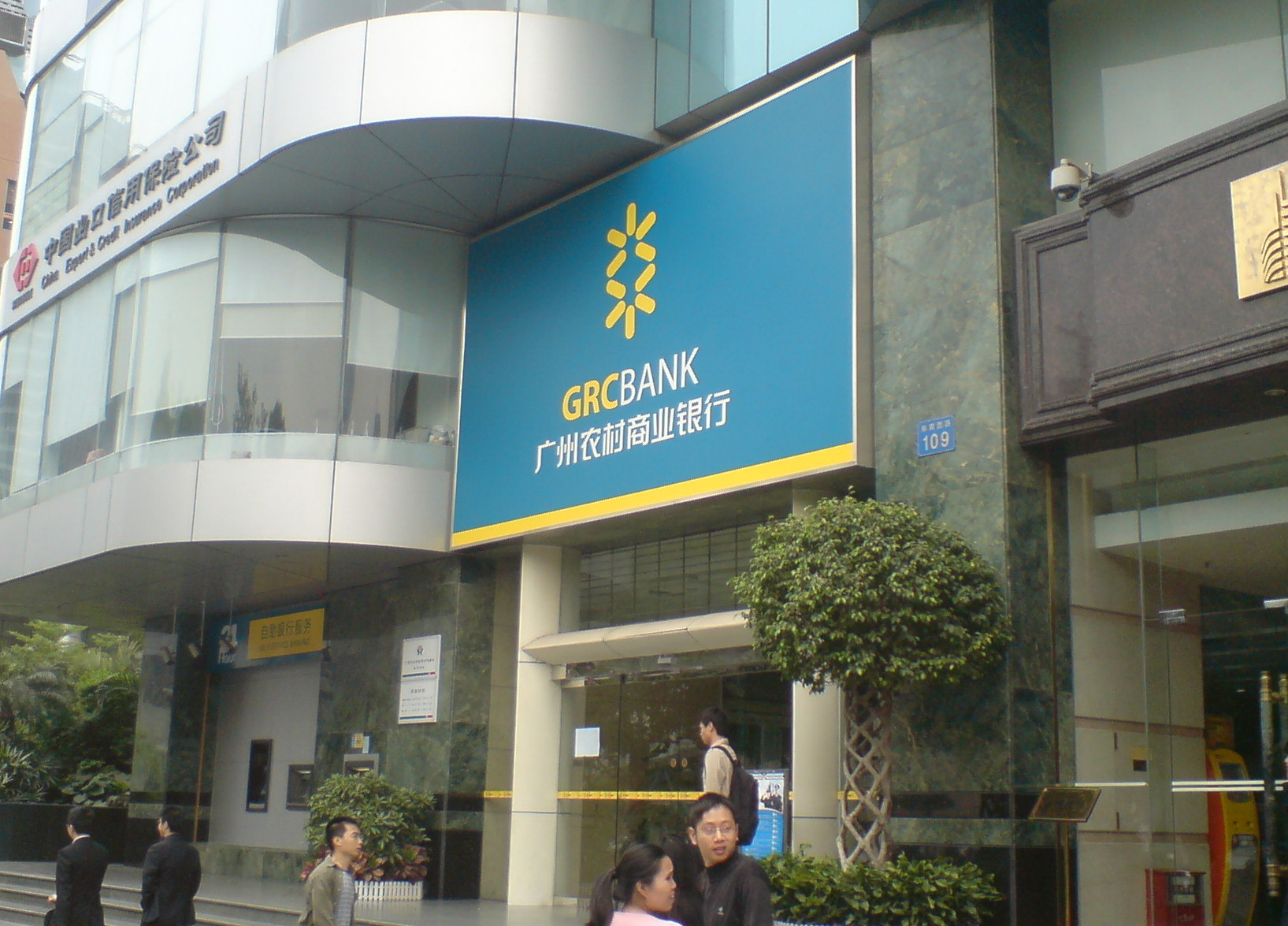 广州农村商业银行体育西支行